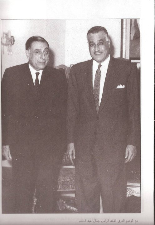 الرئيس_صبري_بك_حمادة_مع_الرئيس_المصري_السابق_جمال_عبدالناصر